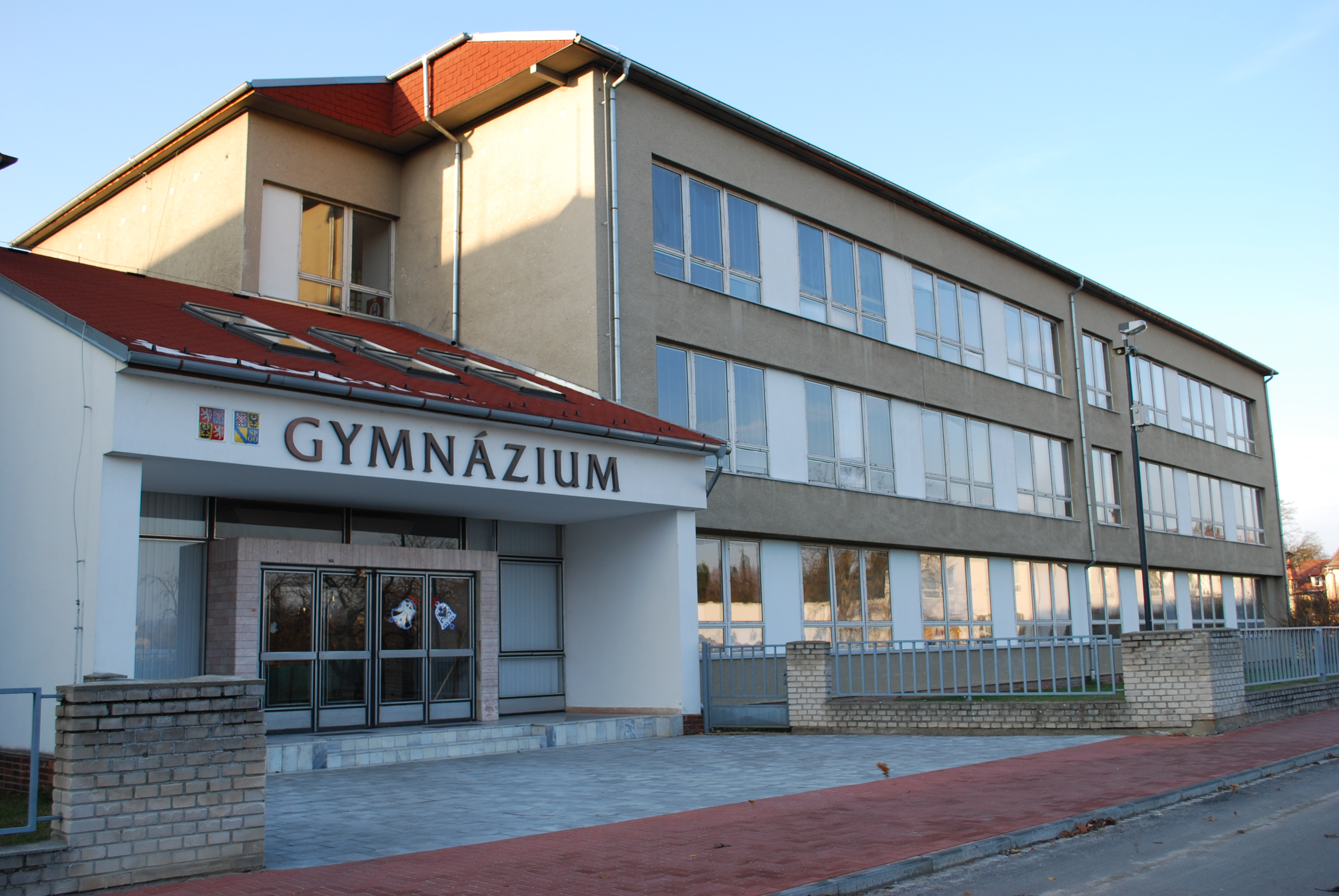 Gymnázium Uničov, nová budova a hlavní vchod vybudované v 80. letech 20. století.